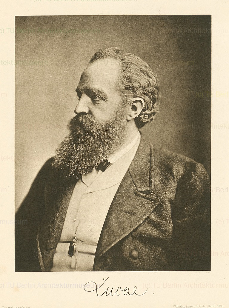 Portrait Richard Lucae (1829-1877). Architekturmuseum der Technischen Universität Berlin in der Universitätsbibliothek